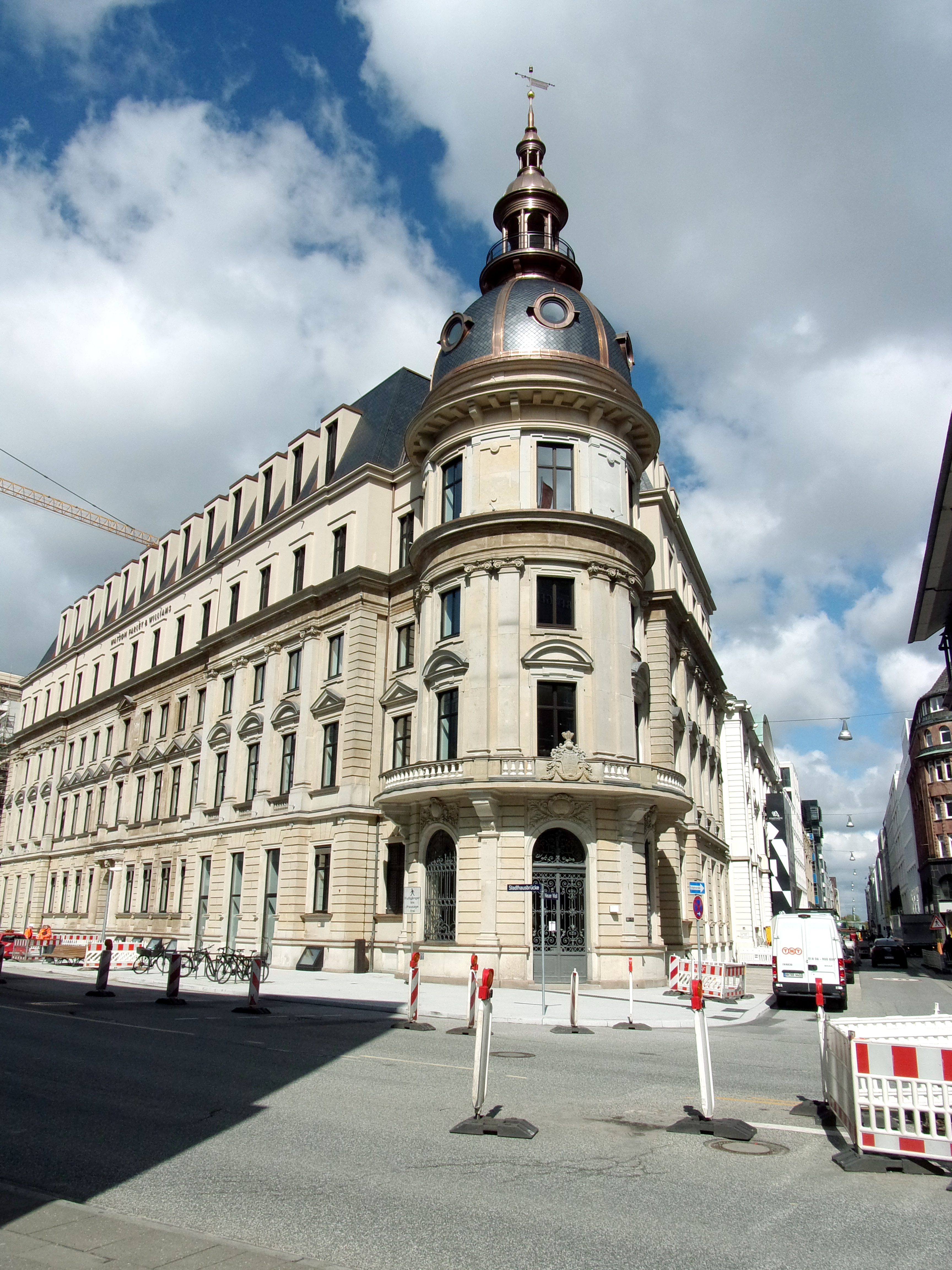 Umbau des ehemaligen Stadthauses Ecke Neuer Wall 88 und Stadthausbrücke. Äußerlich fertig, eine neue Kuppel ist auf´s Dach gesetzt, an einem Fähnchen der Name Quantum. Stand April 2017.This is a photograph of an architectural monument.